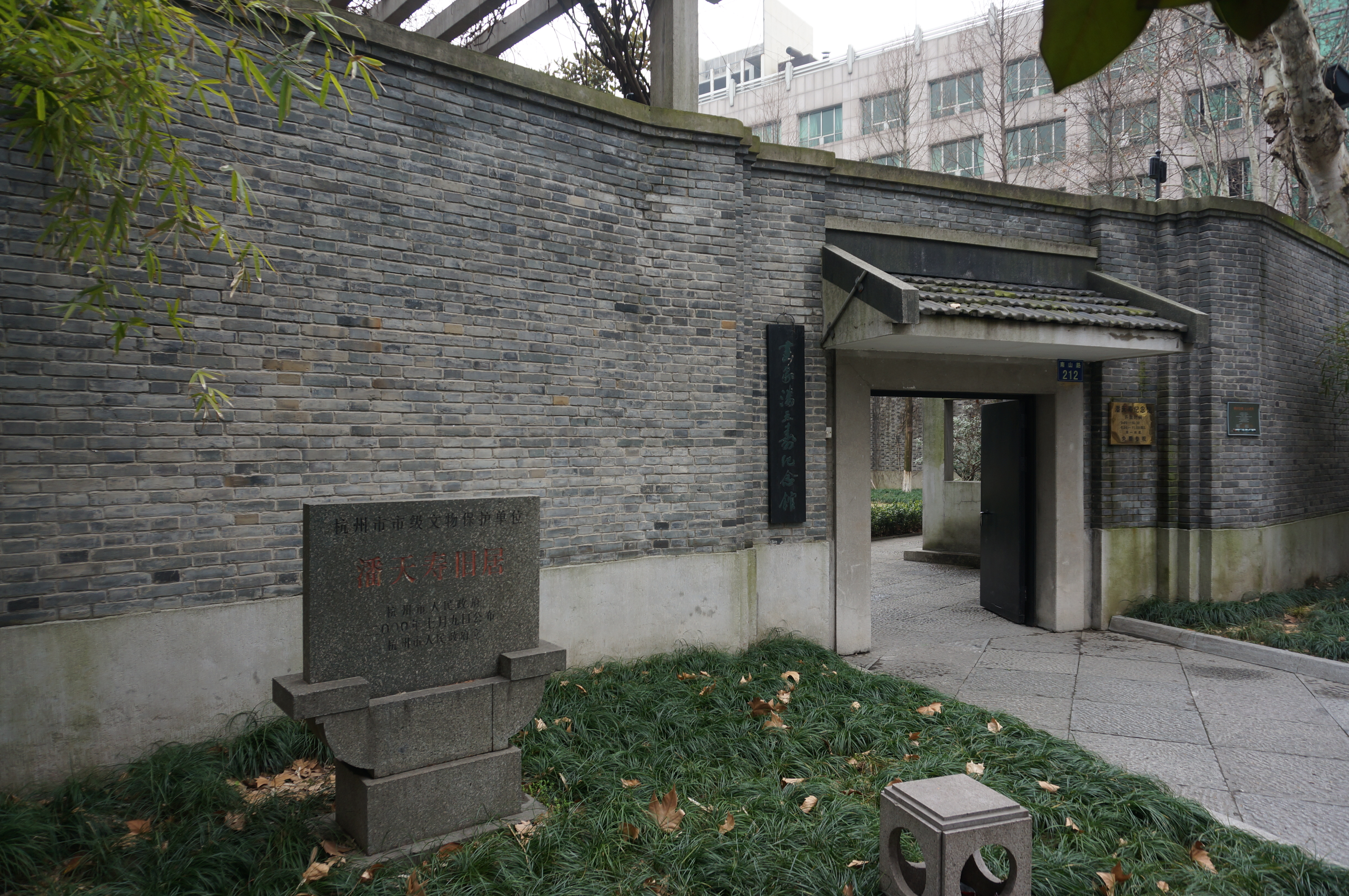 杭州潘天寿旧居，西门。